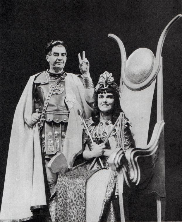 Suomalaiset näyttelijät Joel Rinne (1897-1981) ja Liisa Tuomi (1924-1989) Suomen kansallisteatterin näytelmässä Caesar ja Kleopatra vuonna 1963.